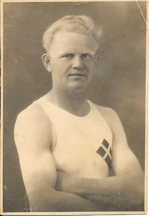 Dansk amatørbokser.